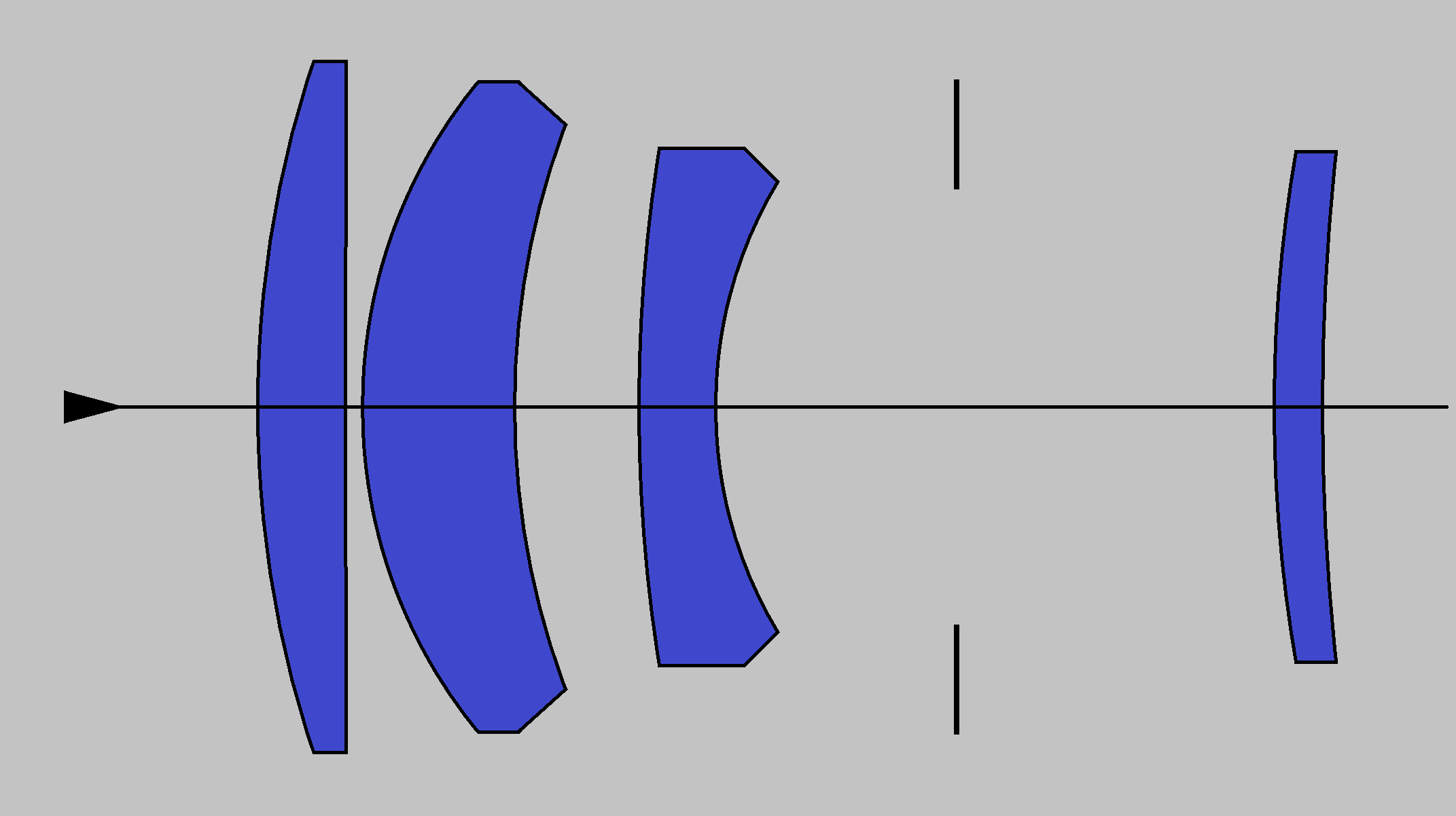 Travenar 1 : 3,5 / 135 R Linsenschnitt Hersteller: Albert Schacht, Ulm/Donau (ca. 1960) Entwickler: Ludwig Bertele